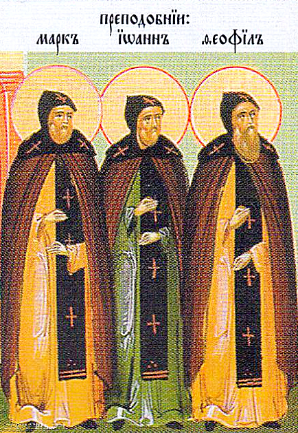 Преподобные Марк Горобокопатель, Феофил Плачливый и его брат Иоанн